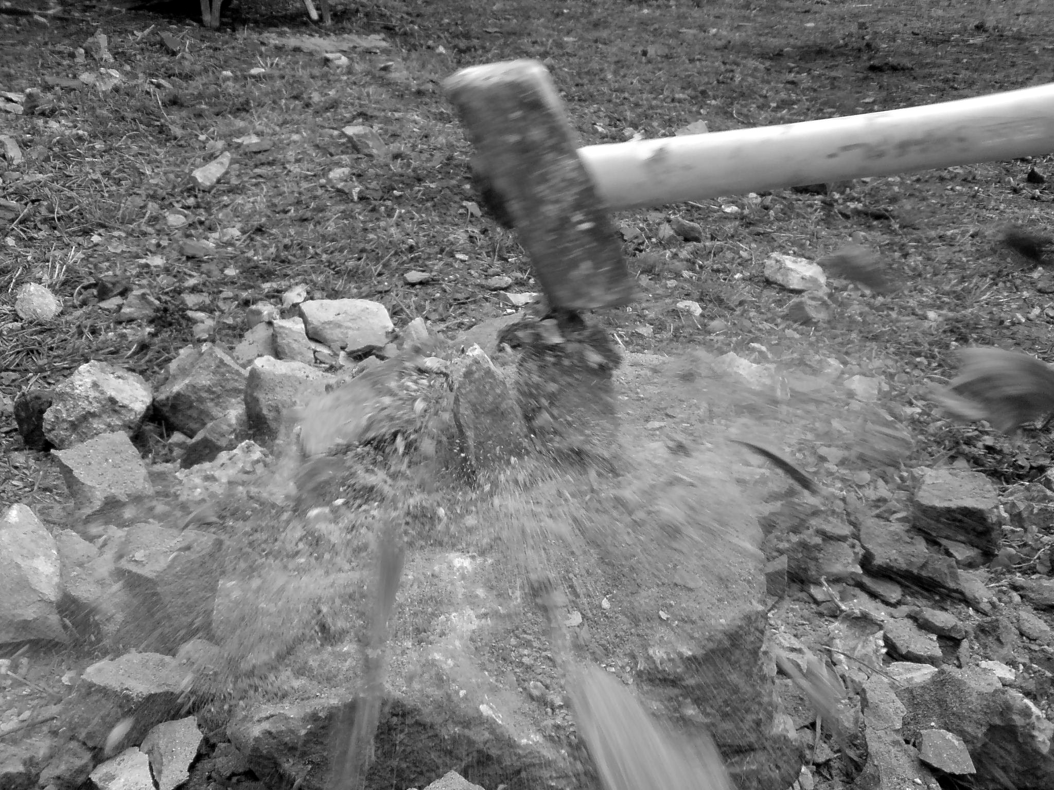 Concassage d'un échantillon de grès dans le cadre d'un chantier de jeune à Clairegoutte en Haute-Saône, Franche-Comté, en été 2009.